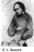 Лаврентий Зизаний (Лаврентий Тустановский; около 1560— после 1633) — протоиерей, известный украинский и белорусский учёный, писатель, переводчик